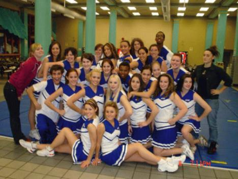 Dawson College Blues 2005-2006